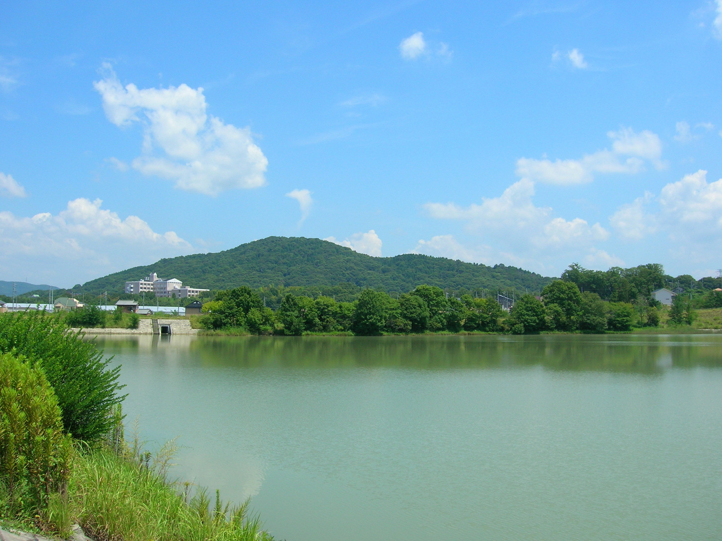 Tōgoku-san (Mt.Tōgoku). Loc: Moriyama-ku, Nagoya city, Aichi Prefecture, Japan. 大久手池から見た東谷山 撮影場所 愛知県名古屋市守山区